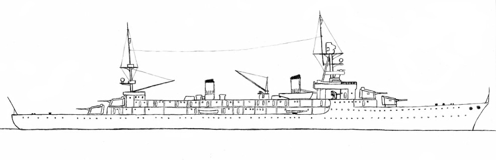 Лёгкий крейсер ВМС Франции "Жанна д Арк"